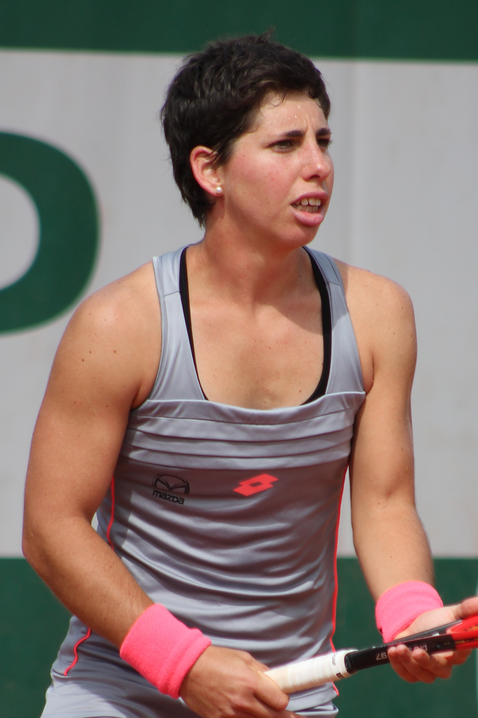 Suarez Navarro RG15 (15)